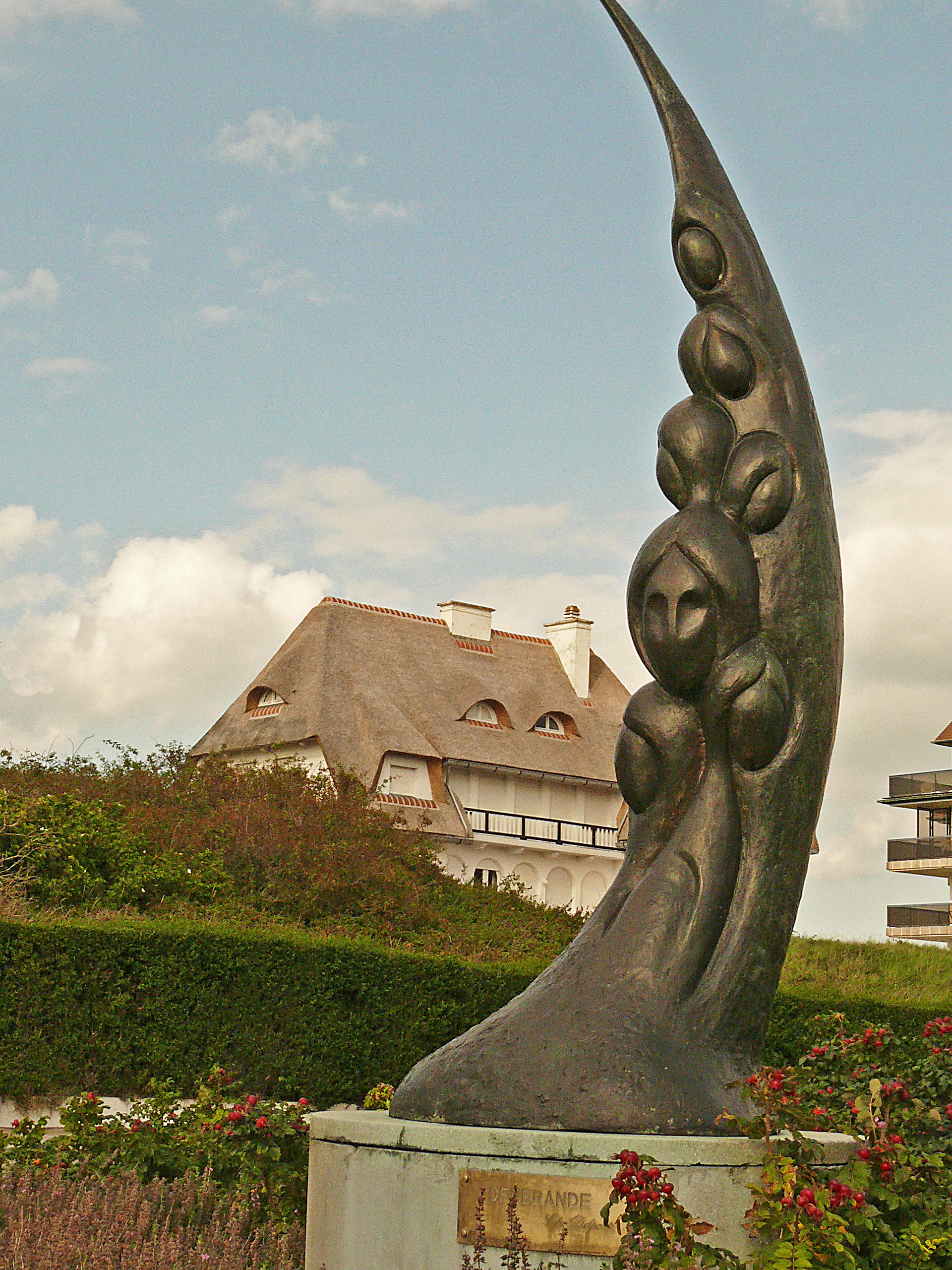 Doornvormig bronzen beeld, naar ontwerp van de Belgische beeldhouwer C. Delporte (Charles Delporte), geplaatst in 1964